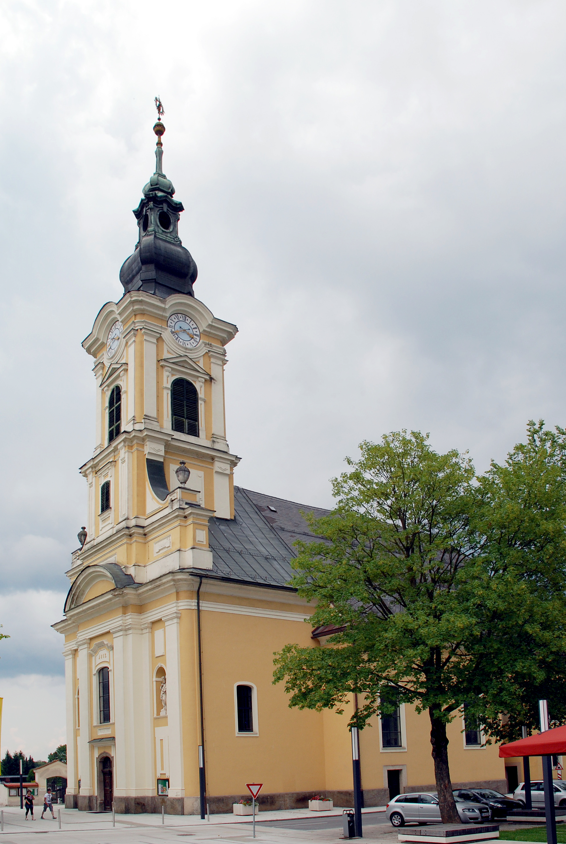 Wies, Steiermark, Österreich: Pfarrkirche Turmfront